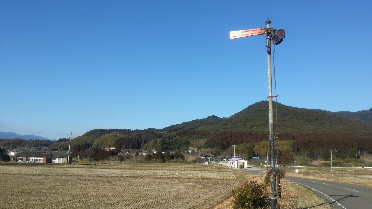 2013-01-28 撮影